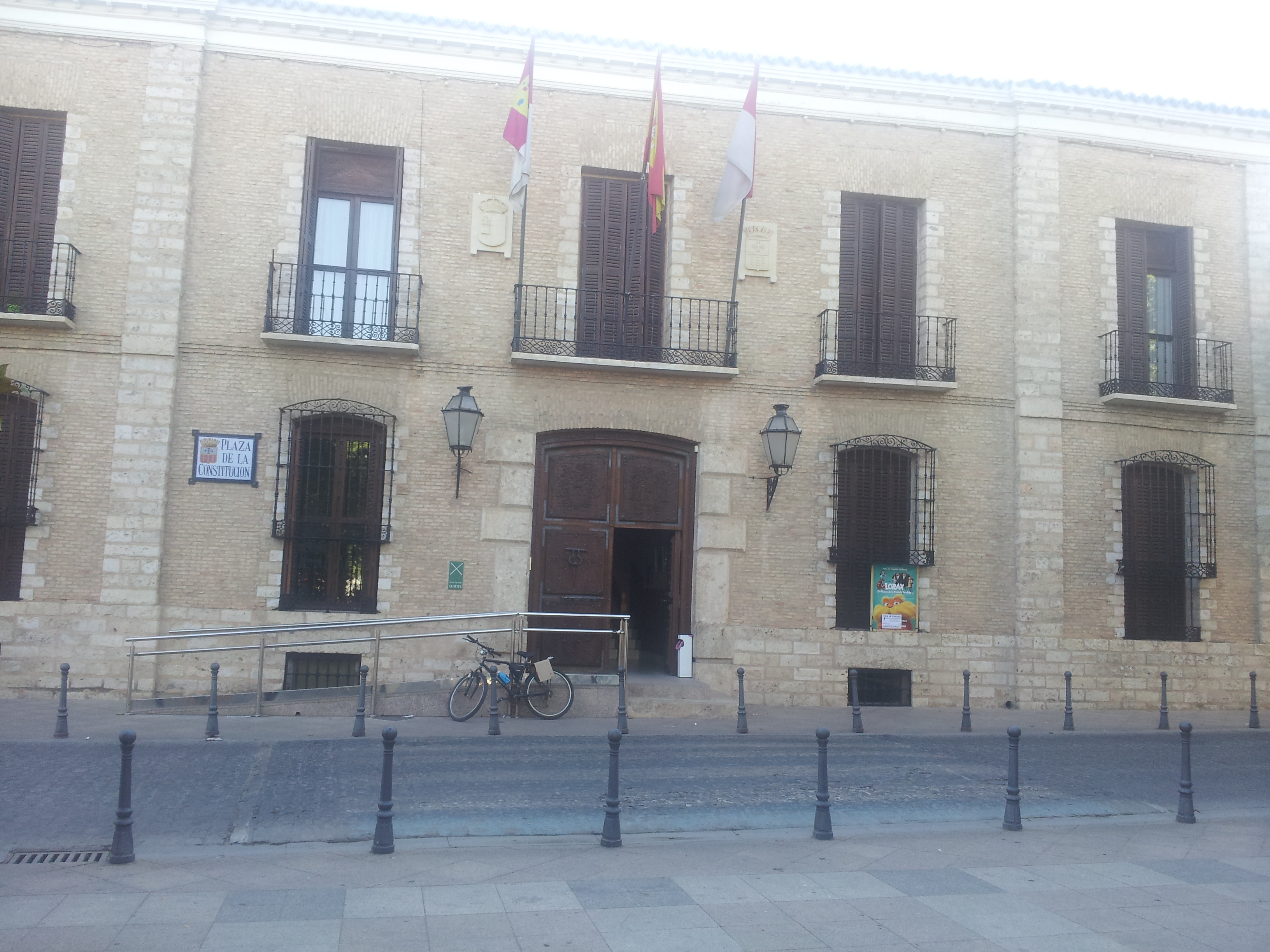 Ayuntamiento de Villarubia de los Ojos (Provincia de Ciudad Real)